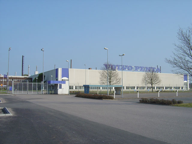 Foto på Volvo Pentas fabrik i Vara 2005, tagen av mig själv.